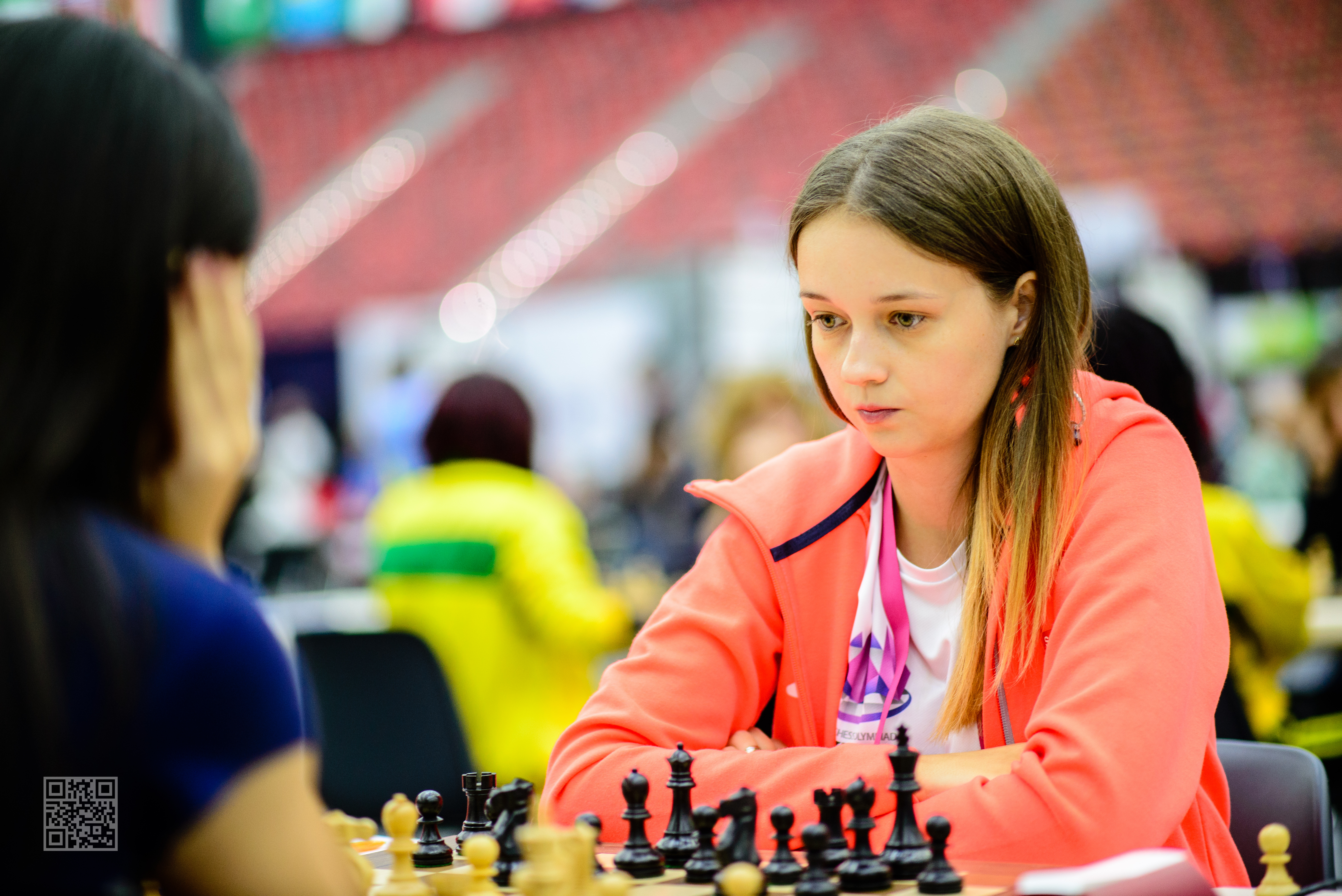 Szczepkowska Karina